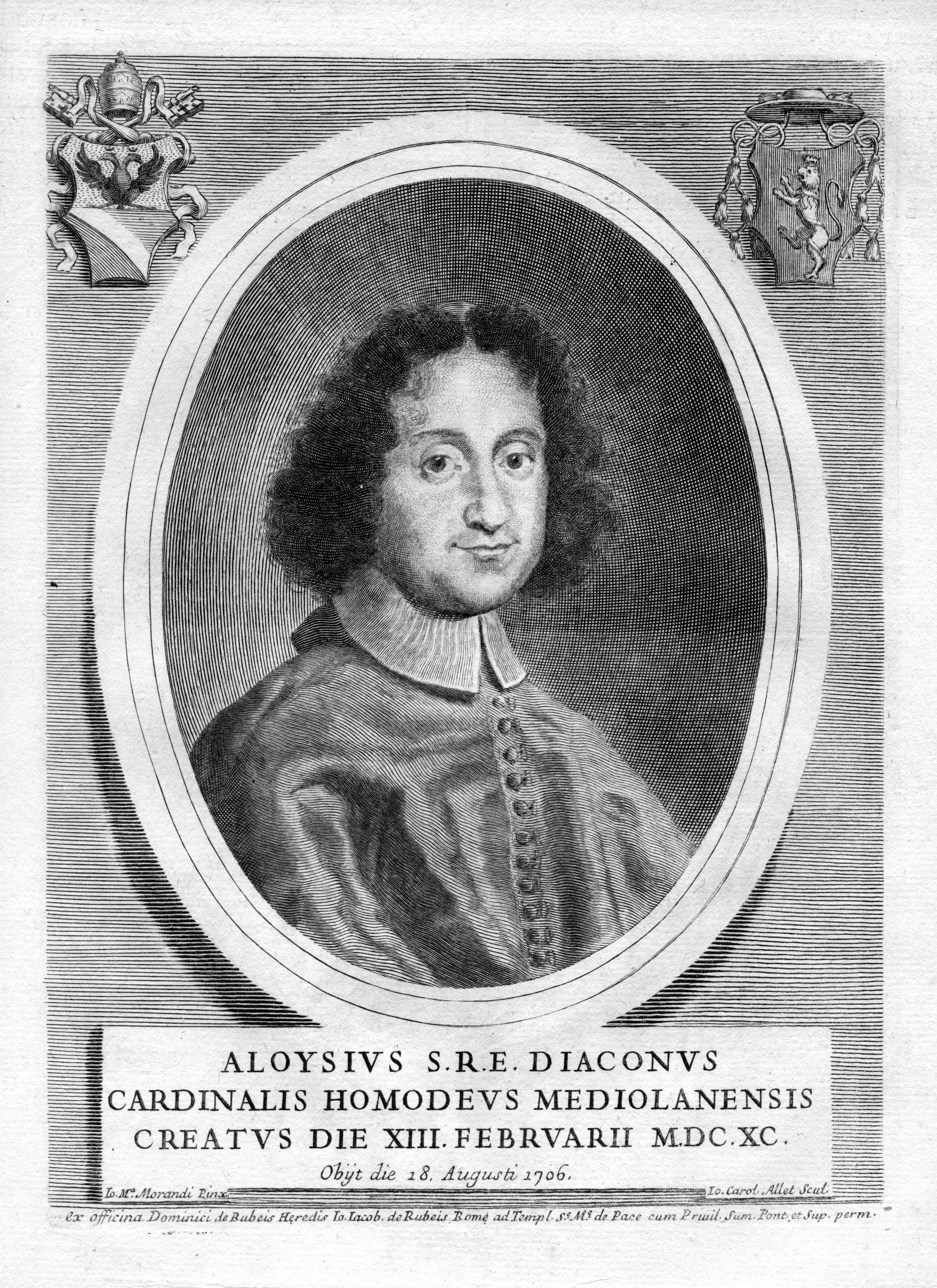 portrait gravé